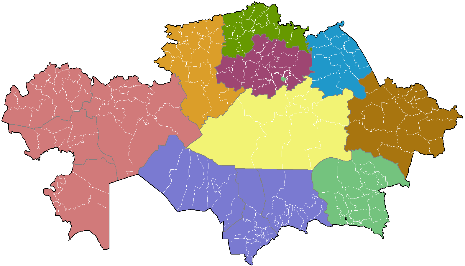 Карта епархий Казахстанского митрополичьего округа